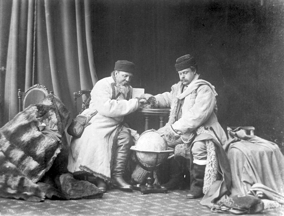 Путешественники на Северный полюс. Портрет Павла Яковлевича Пясецкого и неизвестного мужчины. Автор: А.О. Карелин Место события: г. Н.Новгород Дата: 1870-1880-е гг.